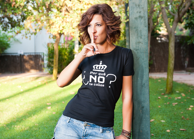 Camiseta ¿Por qué no te callas?, de Goatxa